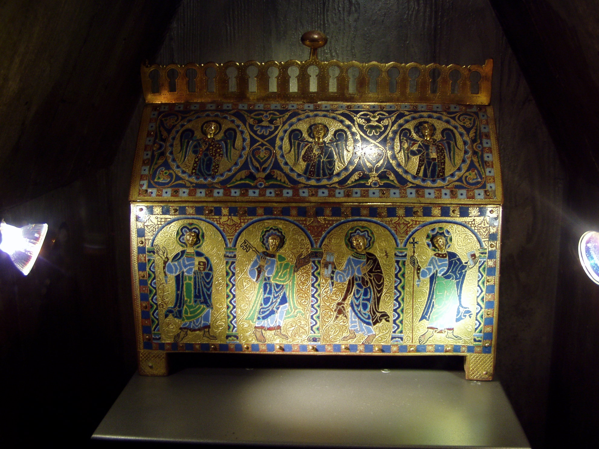 Châsse de Saint Étienne en émail de Limoges faisant partie du trésor de Gimel-les-Cascades.